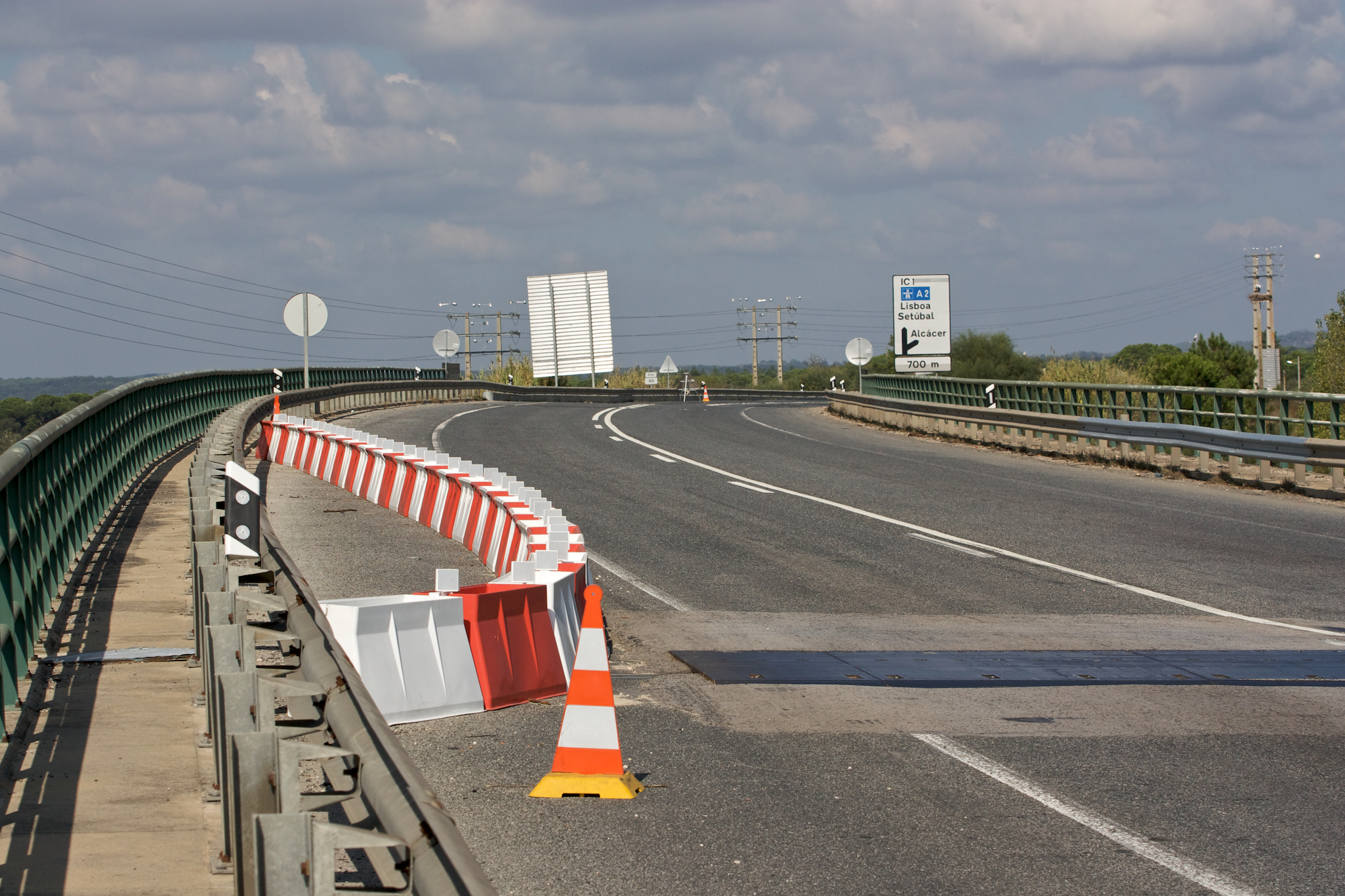 IC 1 em Alcácer do Sal.